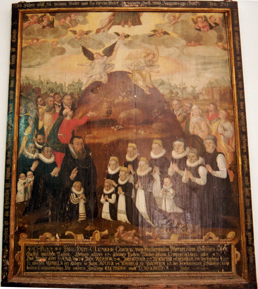 Bildnis der Pfarrersfamilie von Skäßchen bei Großenhain im Jahr 1599. Es entstand im Nachgang der Hochzeit der Pfarrerstochter Sarah mit dem Maler des Bildes, Adam Schilling. Pfarrer Koswig stammte wie auch der Maler aus Finsterwalde, wo dessen Vater, Caspar Schilling aus Rochlitz ebenfalls Pfarrer war. Im Hintergrund ein biblisches Thema. Adam Schilling ist der dritte erwachsene Mann von links, seine Frau ist wiederum die dritte weibliche Person von rechts.